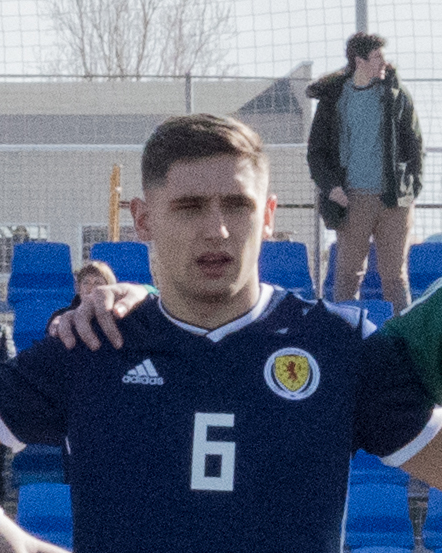 espana-escocia-sub19-3